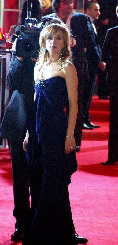 Sylvie Testud, cérémonie des Césars 2008.